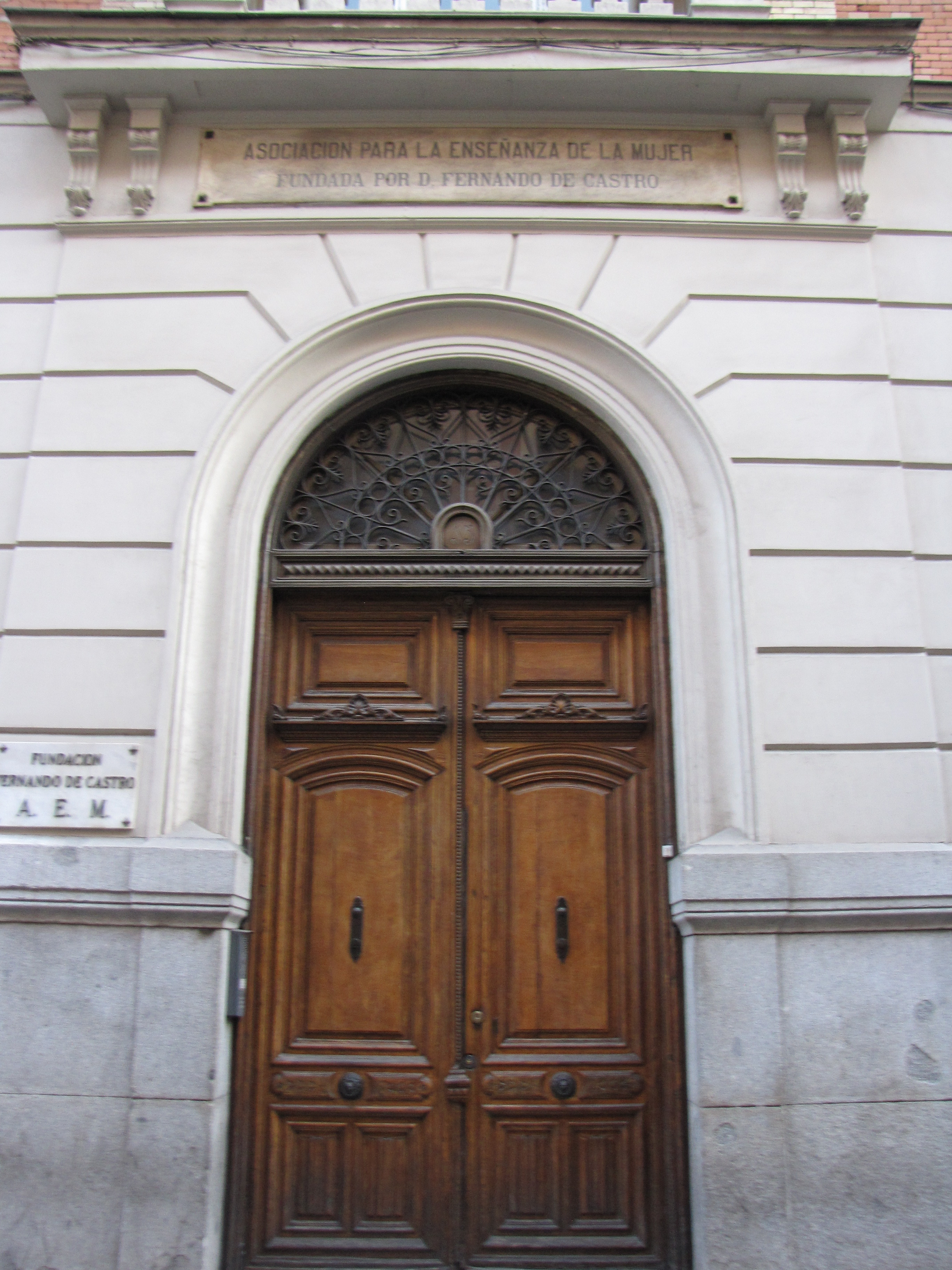 Fotografía de la entrada principal de la Asociación de Enseñanza para la Mujer.